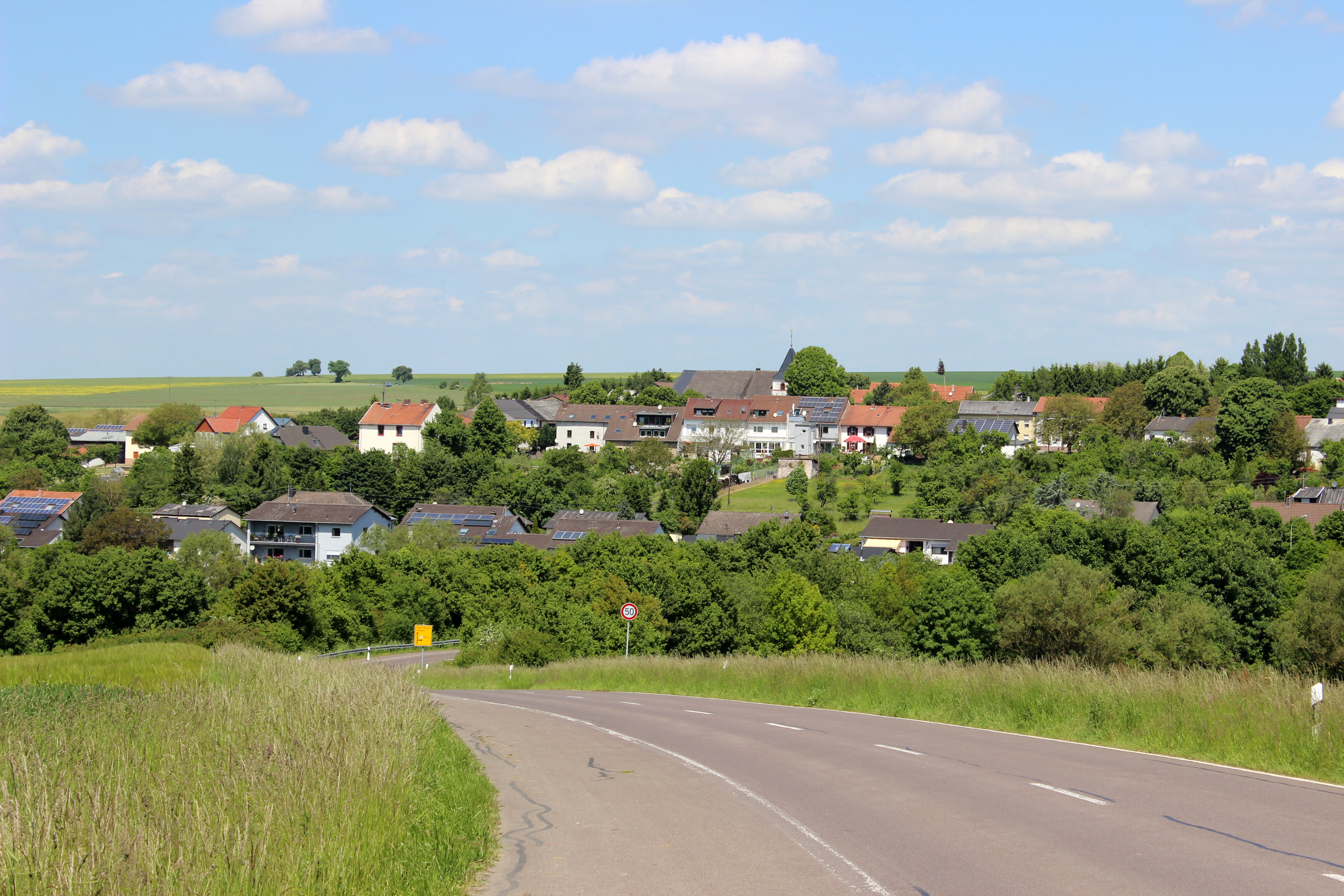 Blick auf Bedersdorf, Gemeinde Wallerfangen, Landkreis Saarlouis, Saarland